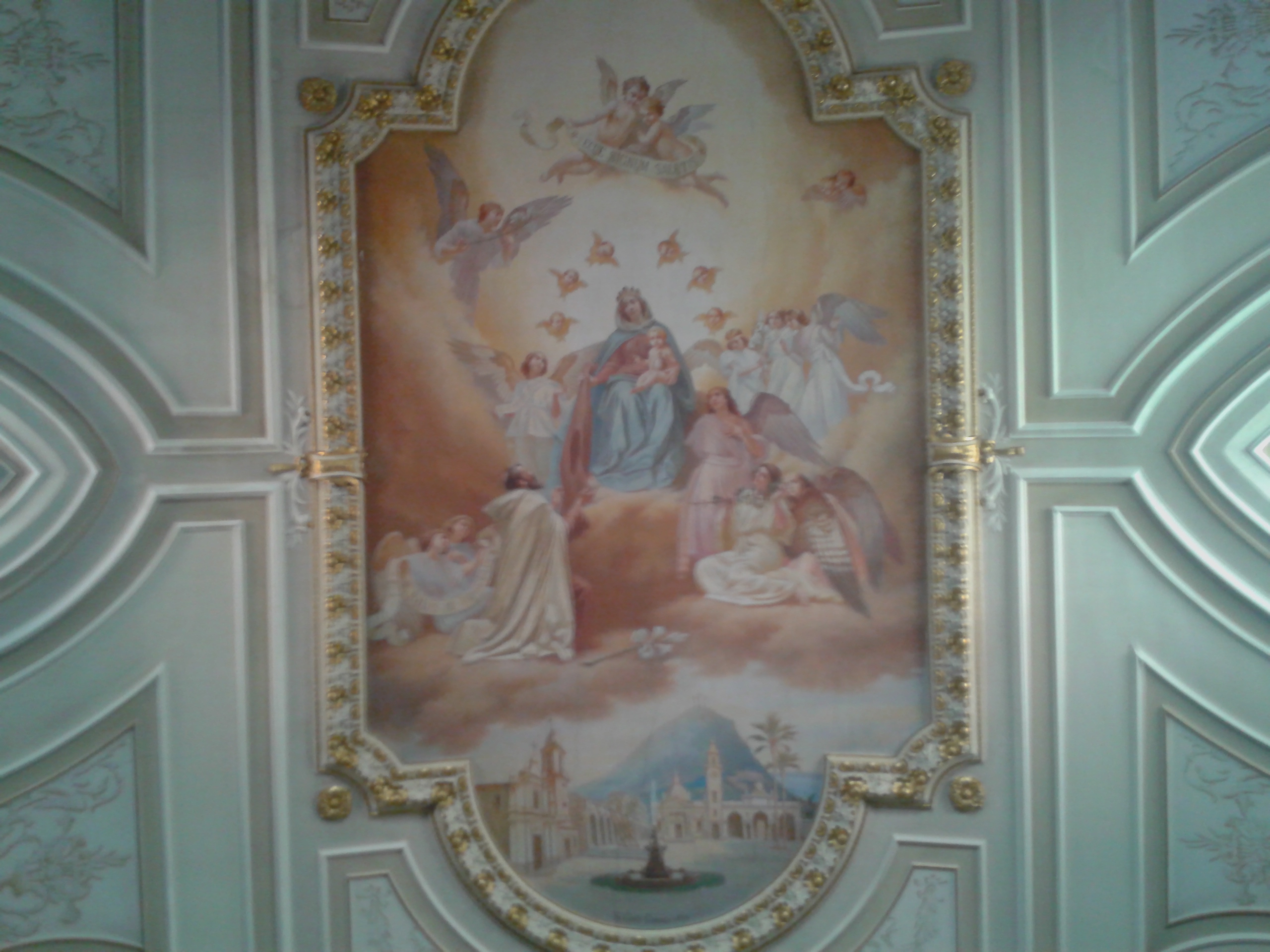 Soffitto chiesa del Carmine di Palmi